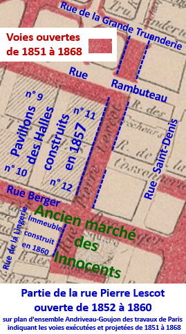 Travail personnel sur plan Andriveau-Goujon des voies ouvertes de 1851 à 1868 sur Gallica BNF